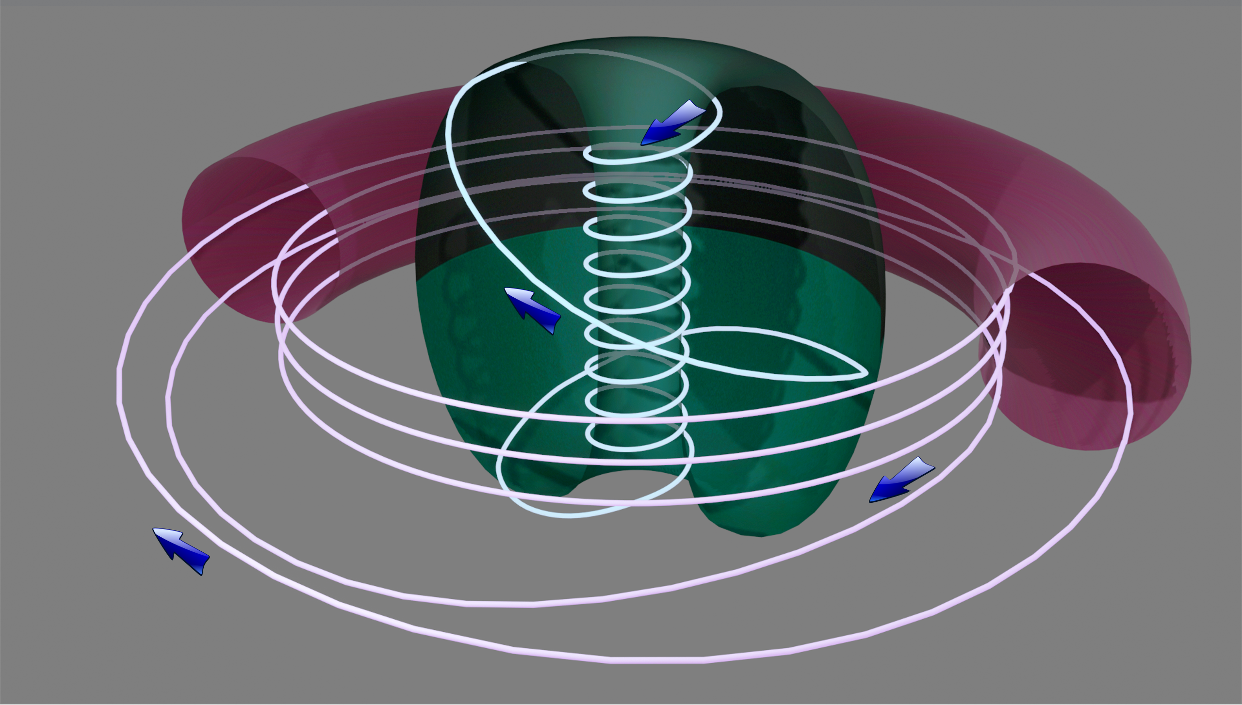 schém& 2 : trajectoire d'une particule d'un plasma de tokamak sphérique vs tokamak torique